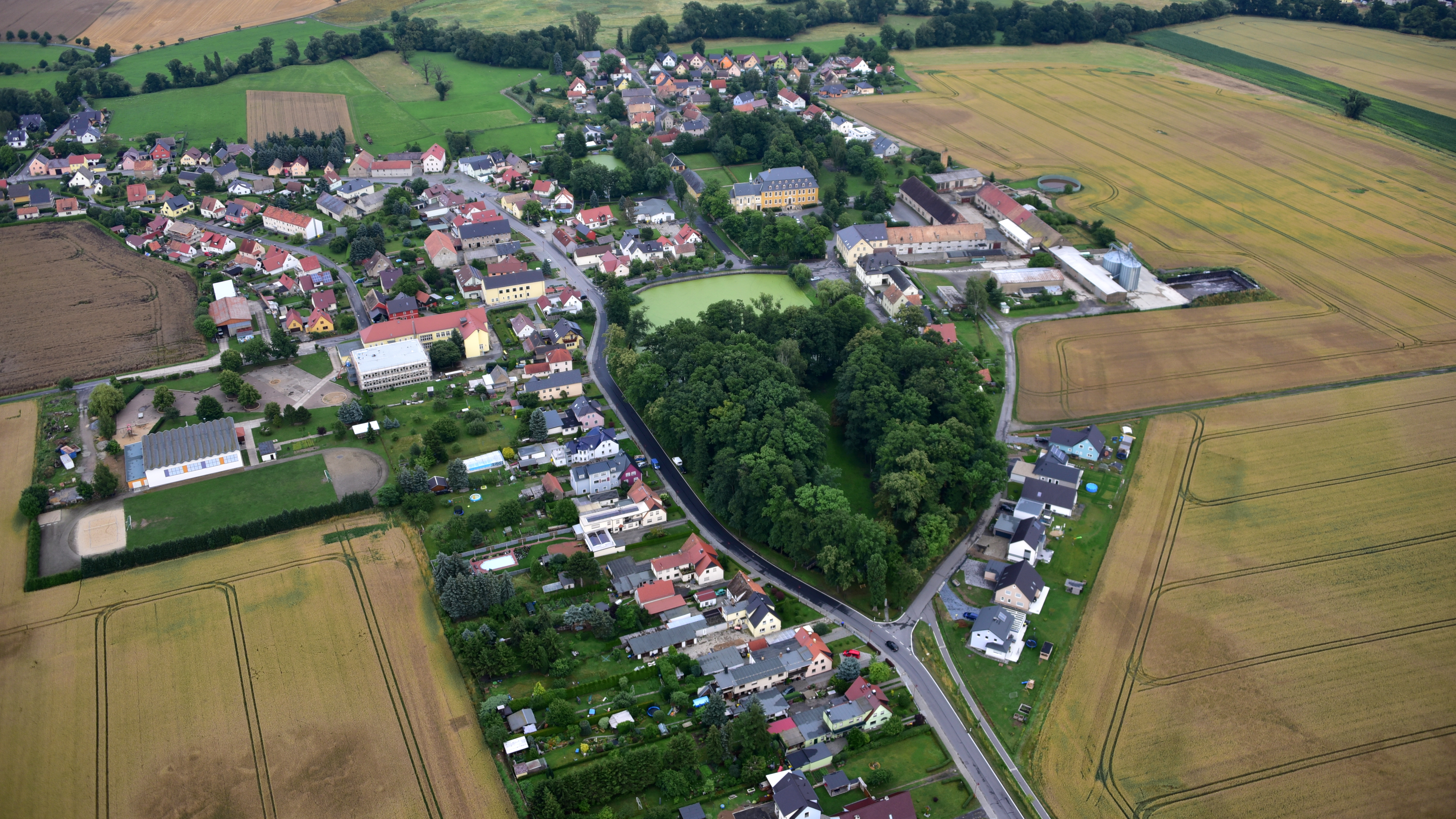 Räckelwitz, Luftaufnahme (2017) Hornjoserbsce: Powětrowy wobraz Worklec (2017)